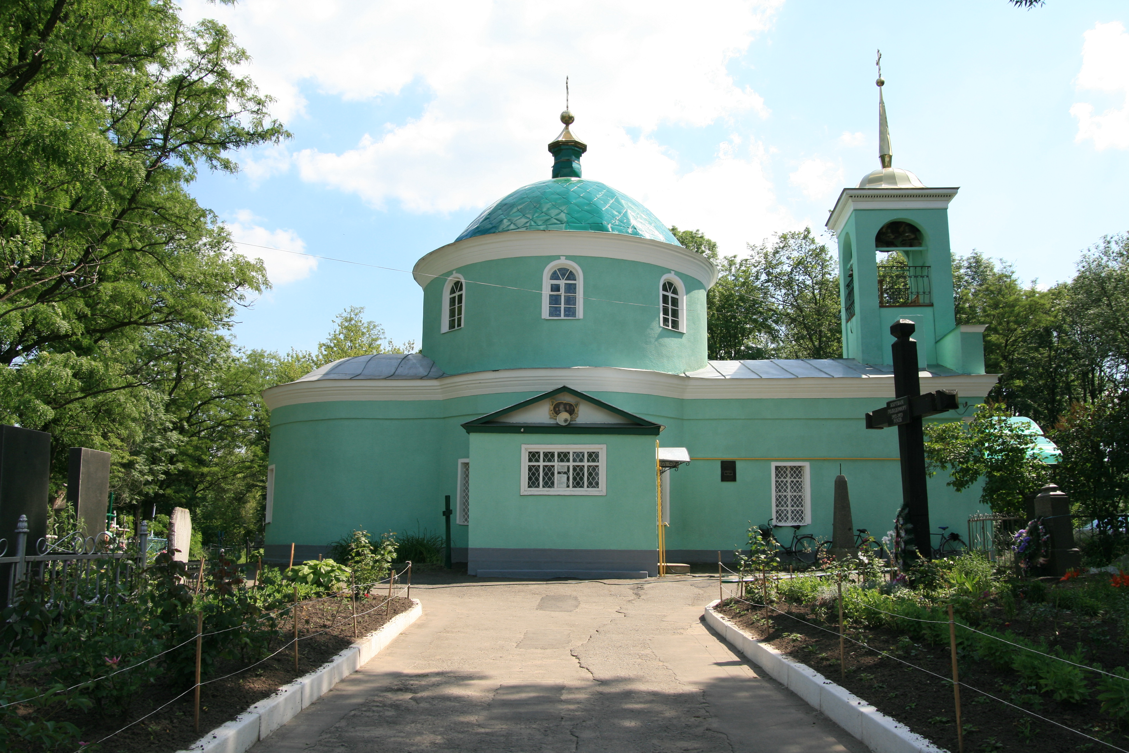 Всiхсвятська церква(мур.), м.Гадяч